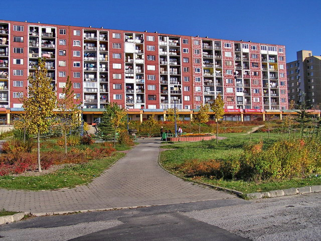 Park